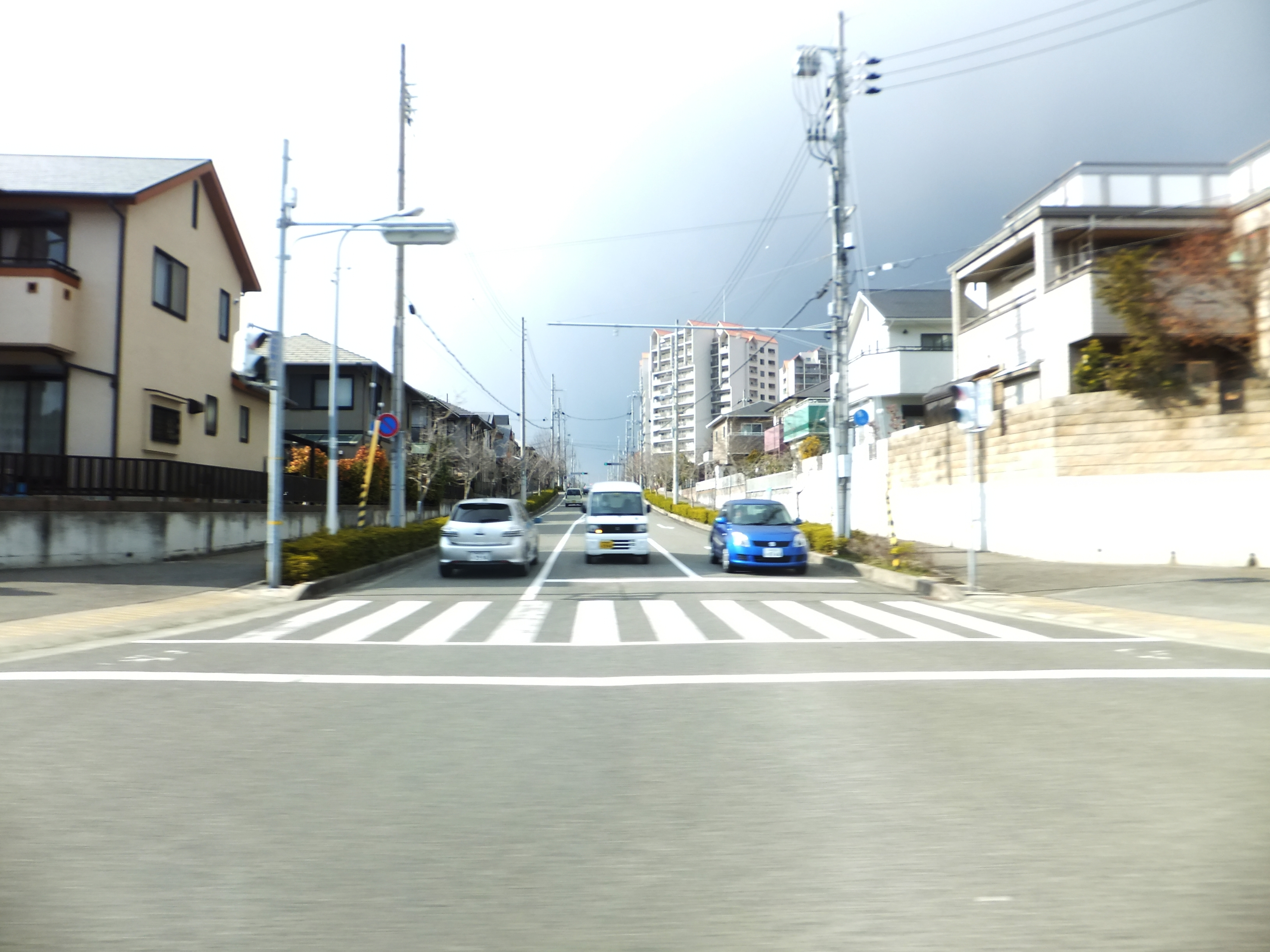 兵庫県神戸市西区井吹台西町3丁目